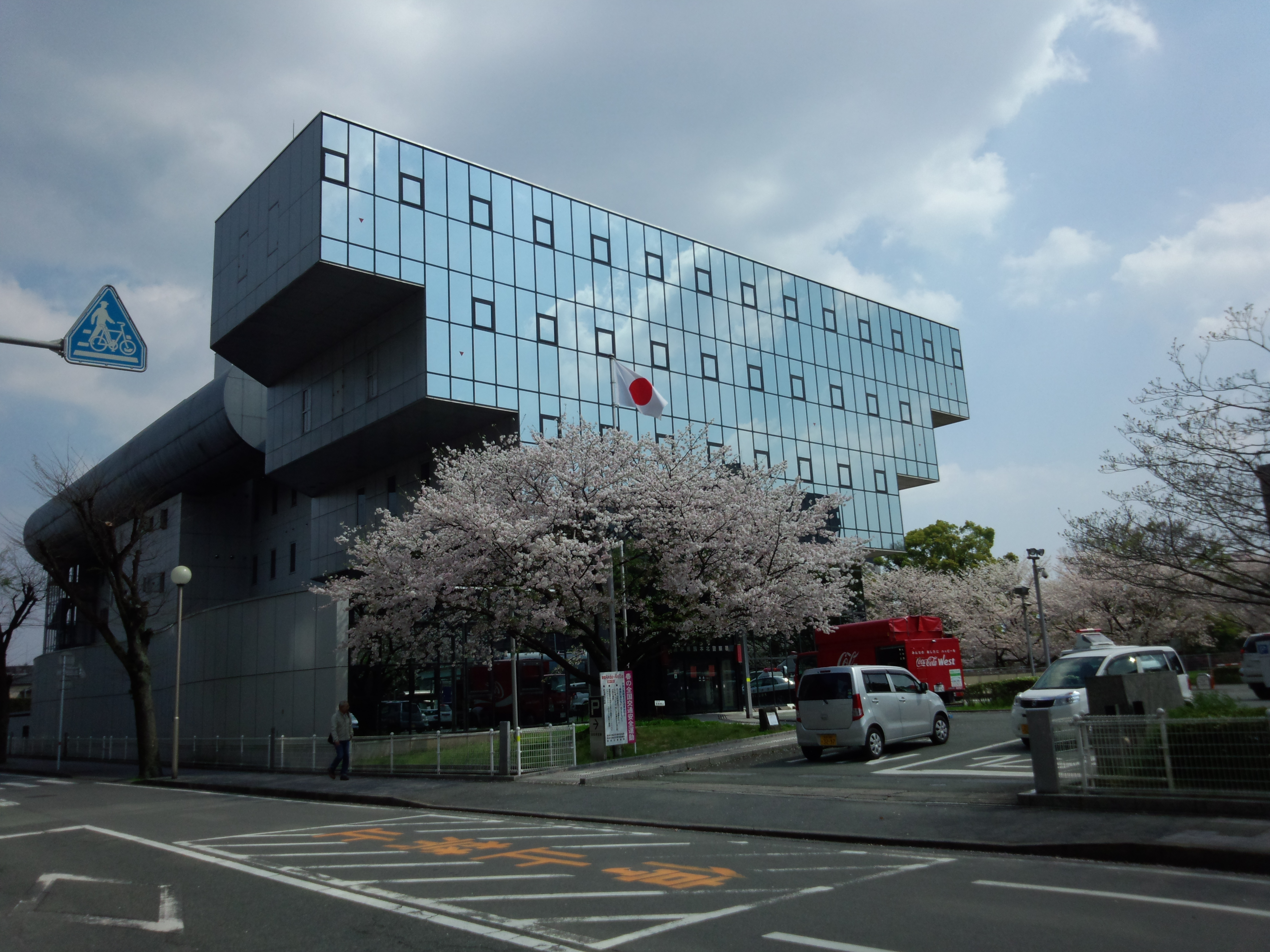 桜の時期に撮影した、熊本県警・中央警察署（当時は熊本北警察署）